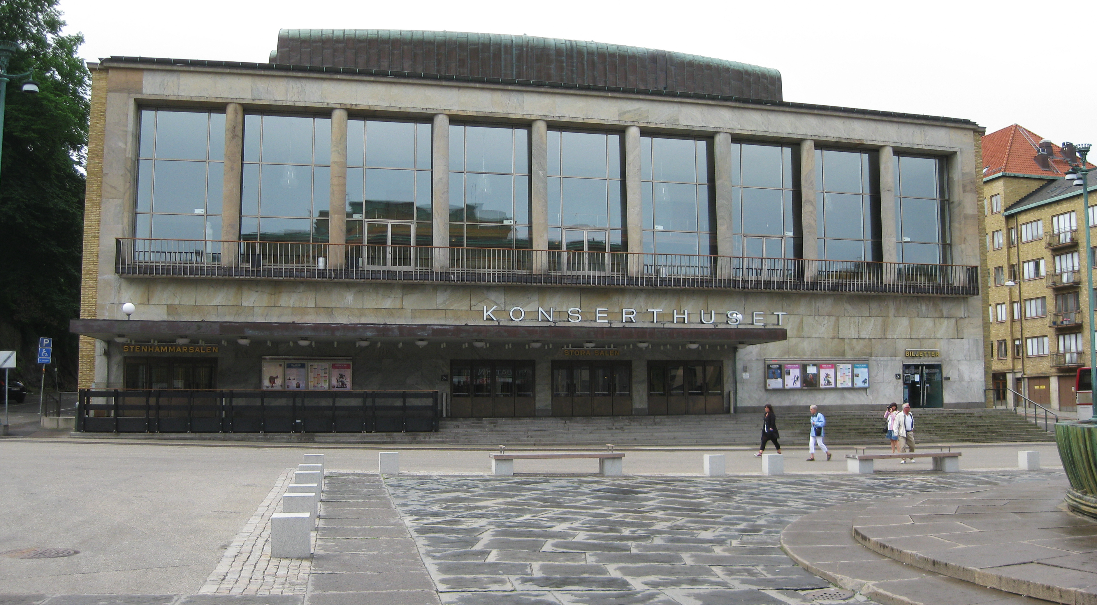 Göteborgs konserthus